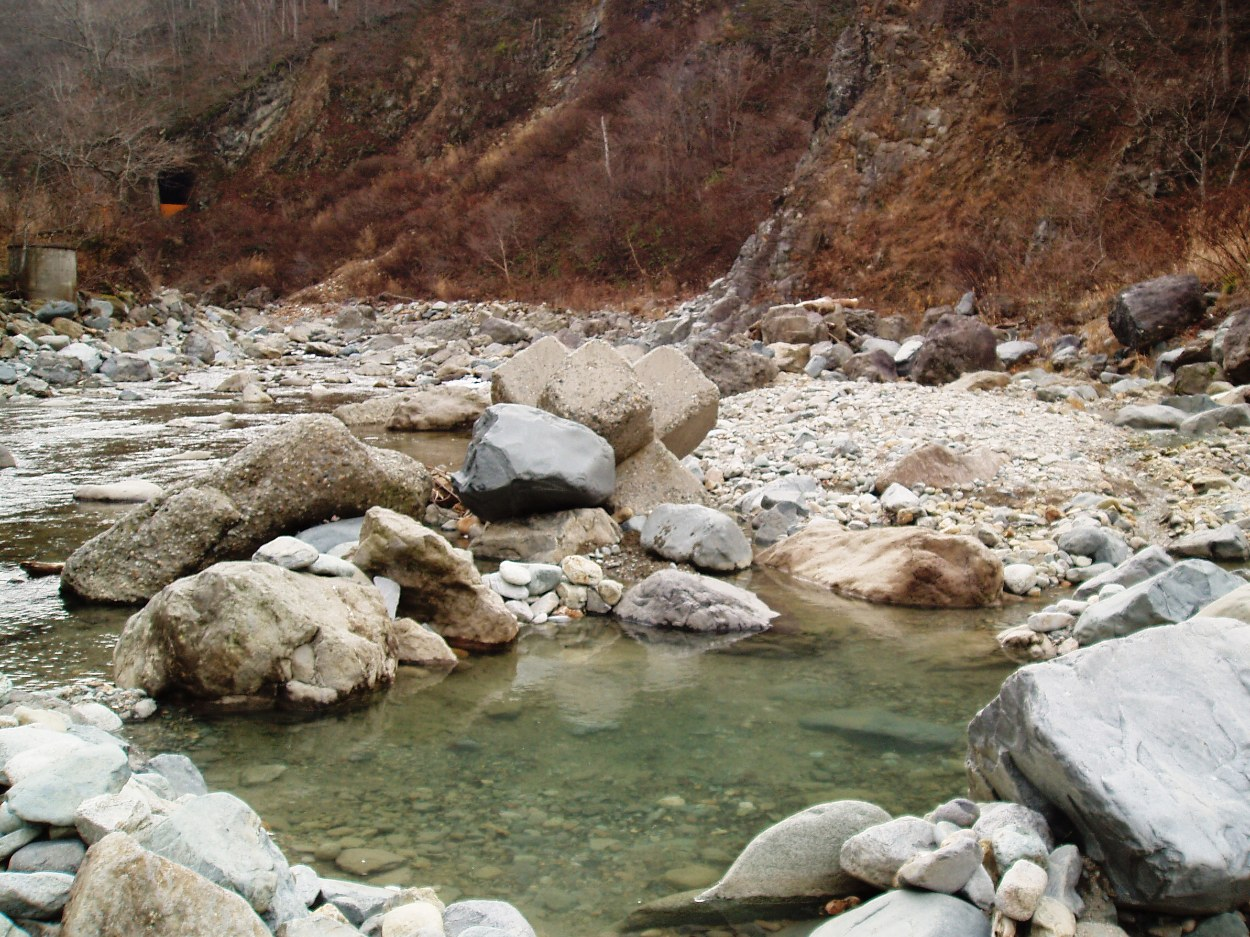 長野県栄村切明温泉野湯